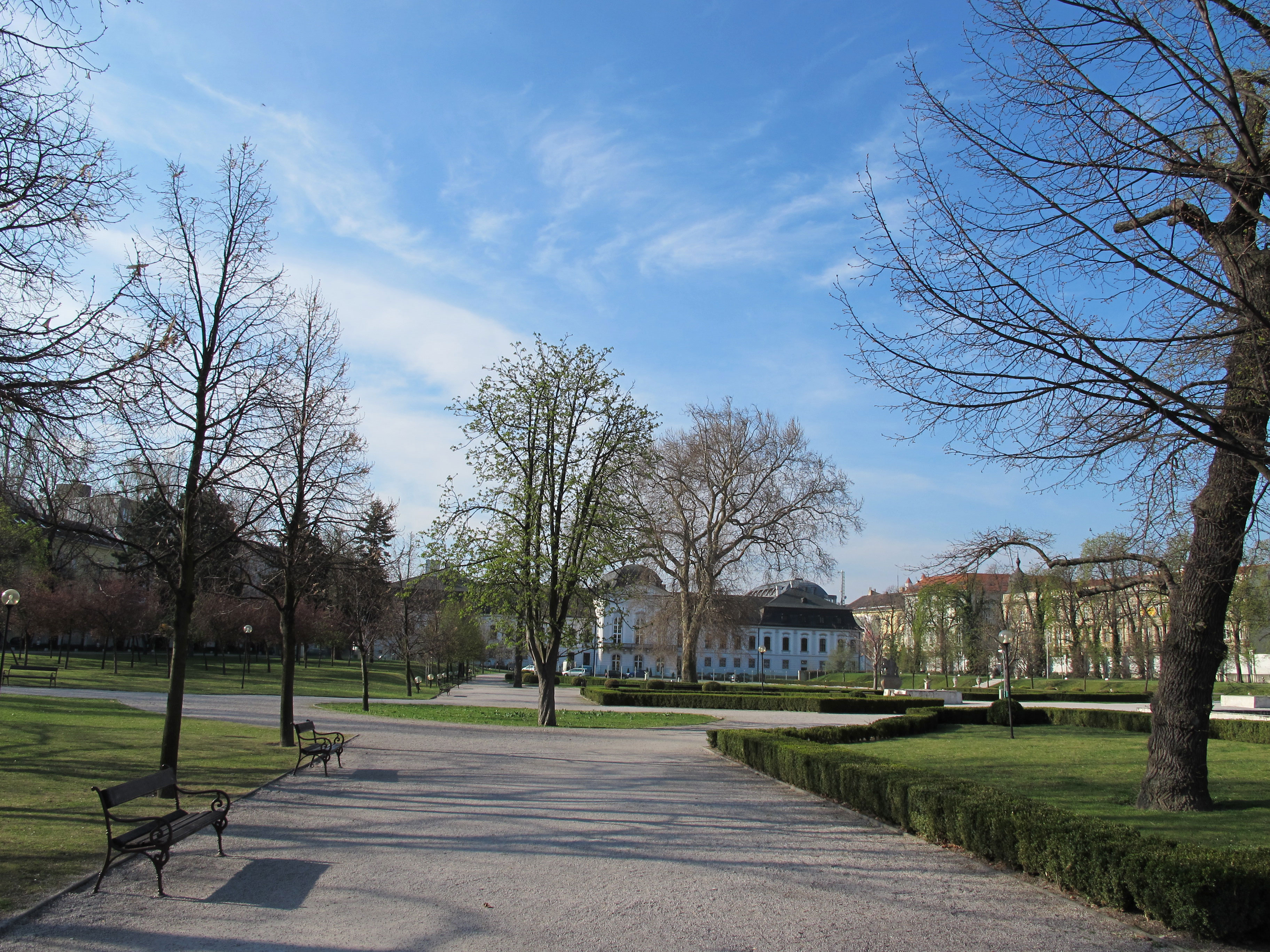 Palacio de Grassalkovich - Bratislava - República Eslovaca Este palacio de verano, de estilo rococó, fue construido en 1760 para el Presidente de la Cámara Real Húngara y para el Consejero de la Emperatriz María Teresa, el Conde Anton Grassalkovich. El suntuoso palacio fue en su época un codiciado lugar de celebración para los eventos de la sociedad aristocrática. Este Palacio es hoy la residencia oficial del Presidente de la República Eslovaca. El Palacio no está abierto al público, sin embargo, su hermoso parque (detrás del Palacio) con árboles centenarios y jardines, sí lo está. El parque es conocido como “El jardín de Grasalkovich” o “El jardín del Palacio Presidencial”. Fue realizado originalmente como un jardín de estilo francés y todavía ofrece un espacio tranquilo, lejos del bullicio de la ciudad. Desde el año 1919 es el destino preferido para dar paseos, organizándose también conciertos al aire libre allí. Contiene una estatua de la emperatriz María Teresa a caballo, la Fuente de la Juventud, realizada por el destacado escultor eslovaco Tibor Bártfay y estatuas vanguardistas de artistas contemporáneos. En el parque se encuentra también el “Alameda de los presidentes”, que es dónde todo presidente extranjero, de visita oficial a Eslovaquia, planta un pequeño roble. Dirección: Grassalkovichov palác (Prezidentský palác) Hodžovo námestie 811 01 Bratislava mas información : visit.bratislava.sk/ES/ Blog de Bratislava : .es/ Ver el video de Bartislava : Fotografías